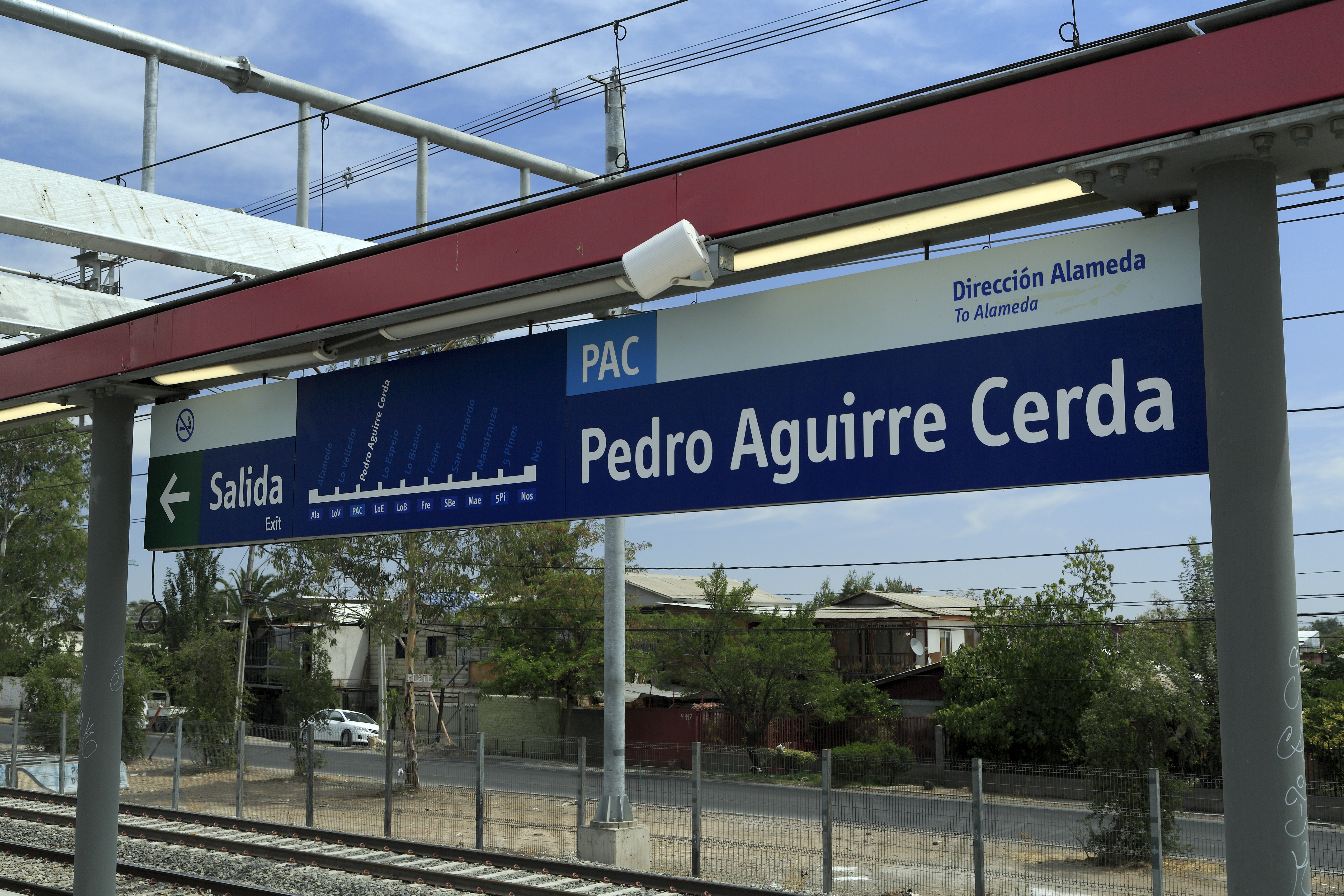 Überraschenderweise sollen die Vorortgleise nur für eine relativ kurze Strecke zwischen Alameda (Hbf) und Nos genutzt werden. Möglicherweise werden die »Metrotrén«-Züge die Ferngleise benutzen. In fußläufig erreichbarer Nähe zur Eisenbahnstrecke gibt es in diesem erkennbar ärmeren Stadtgebiet kein weiteres Schnellverkehrsmittel, die U-Bahn-Strecken sind deutlich zu weit entfernt. Über den vorgesehenen Takt ist noch nichts bekannt.